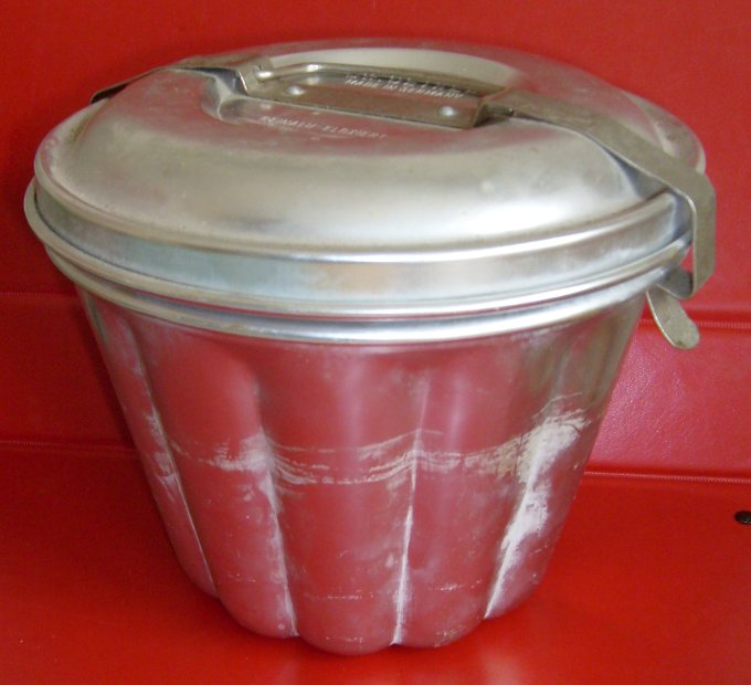 Bakvorm voor een poffert